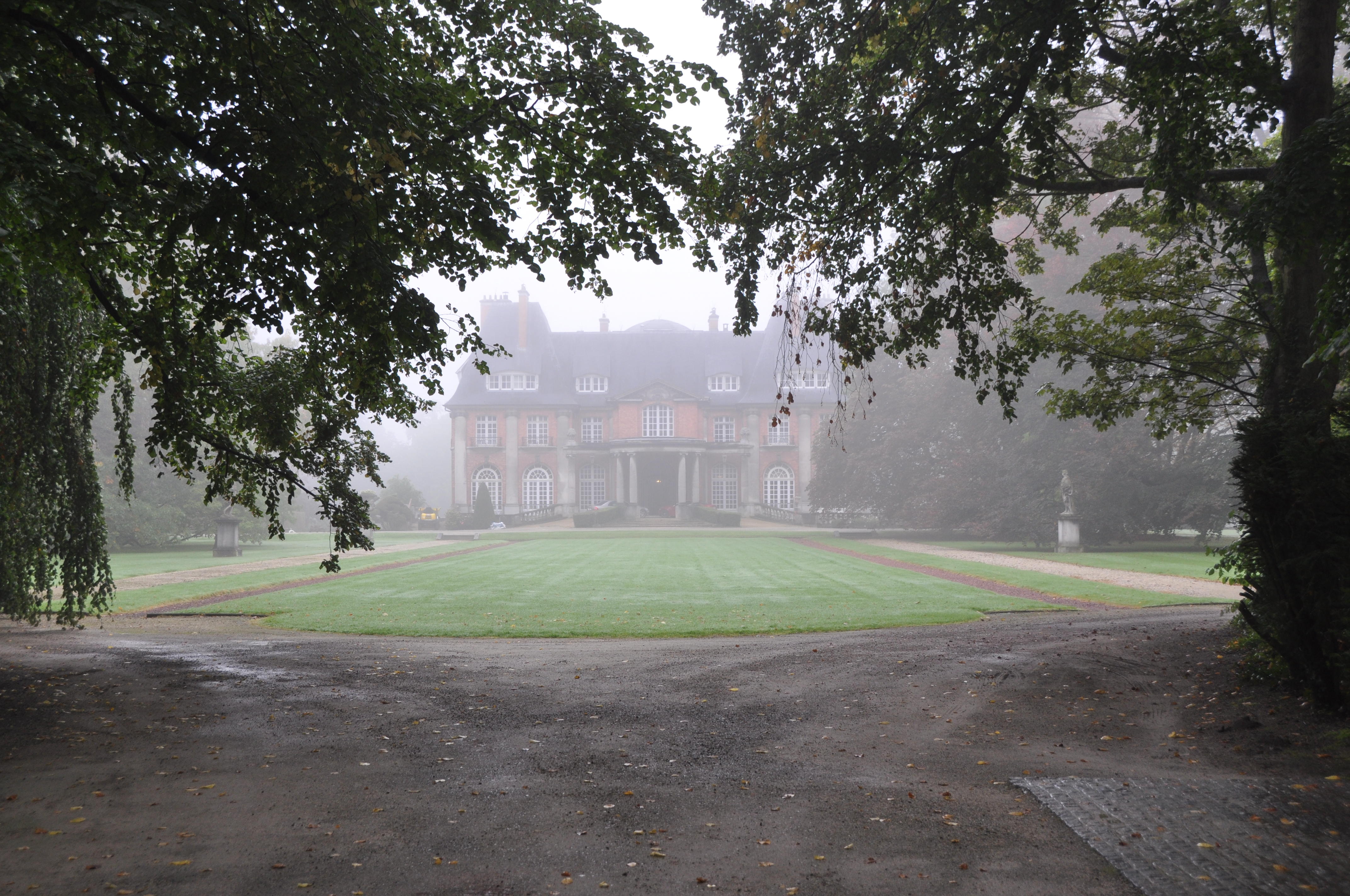 Un matin brumeux d'automne au château de La Fougeraie, château de la famille Wittouck.